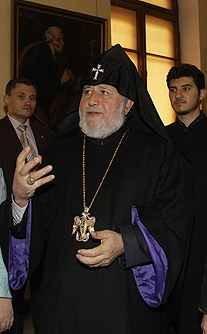 Гарегин II